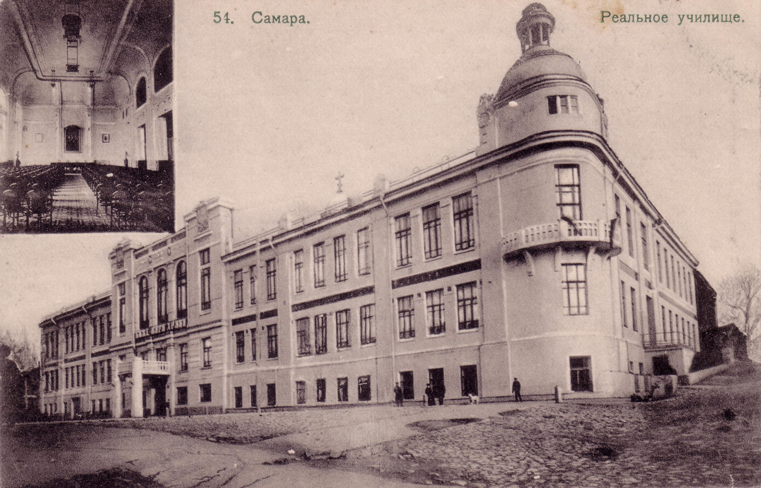 Реальное училище Самара